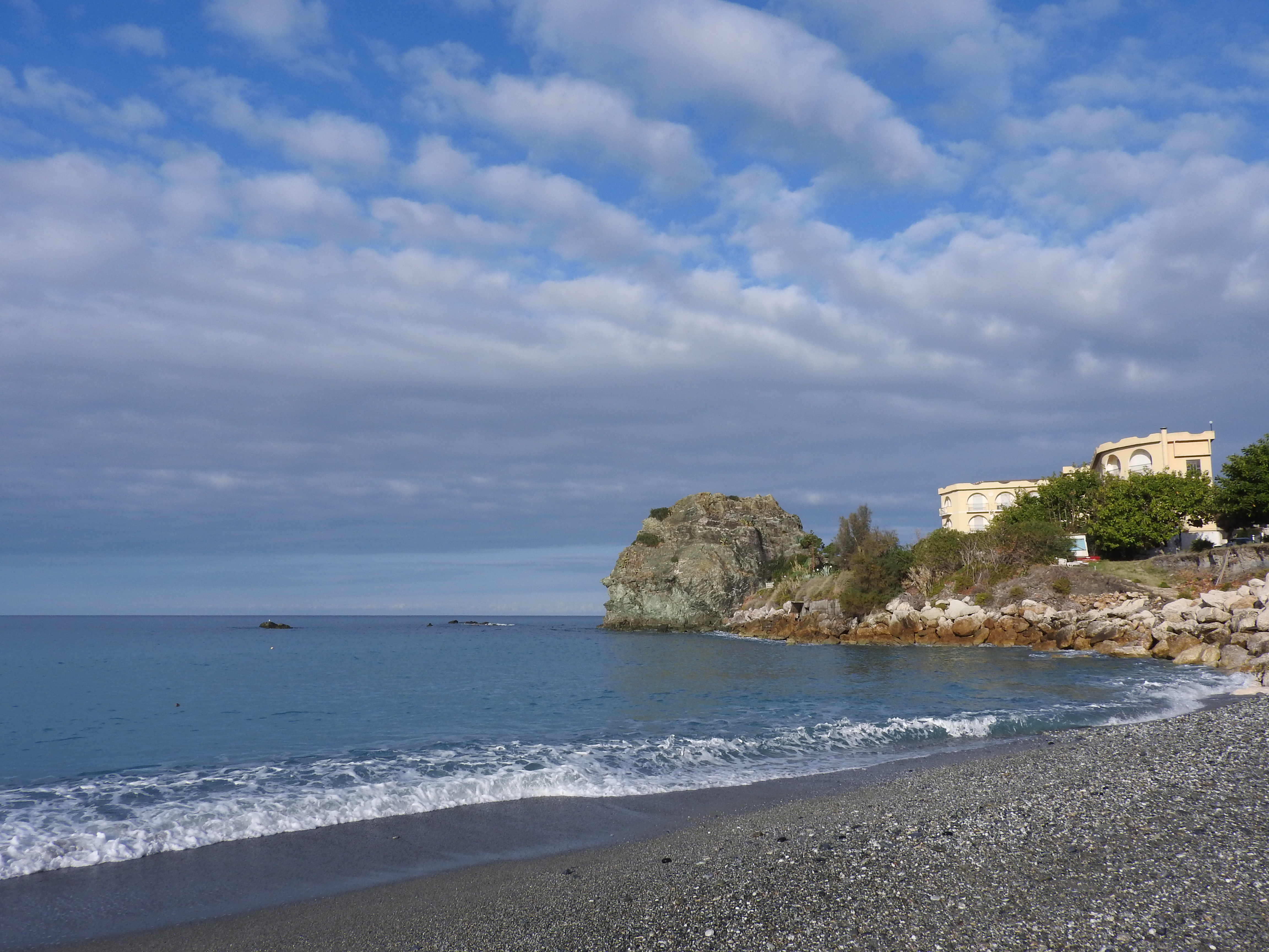 la spiaggia di Coreca vista nei pressi della Scogliera